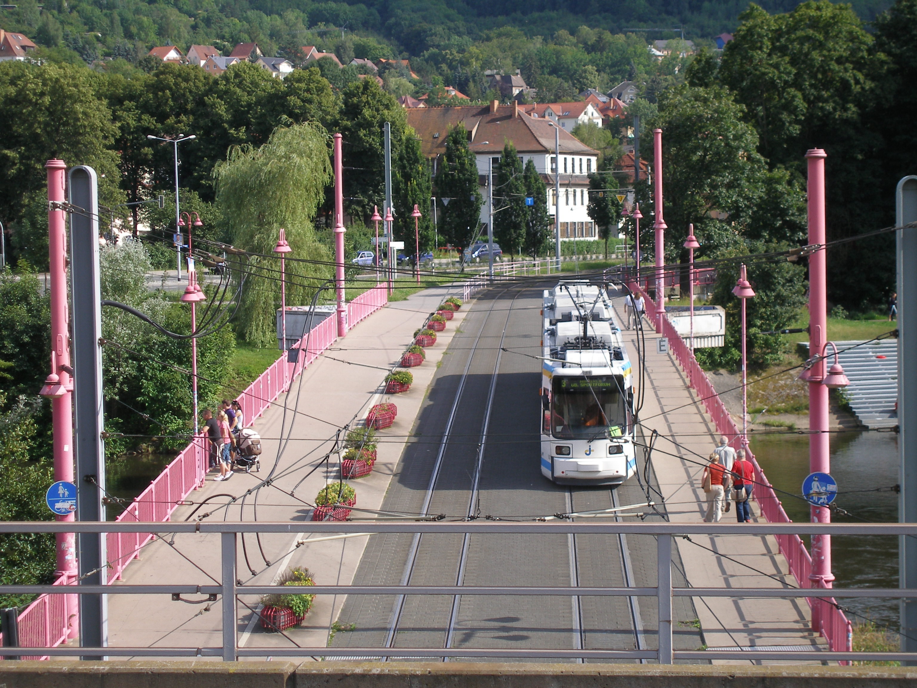 Blick auf die zur Straßenbahnbrücke umgebaute "alte" Paradiesbrücke vom Eisenbahn-Bahnsteig Jena-Paradies aus, 26. Juli 2009